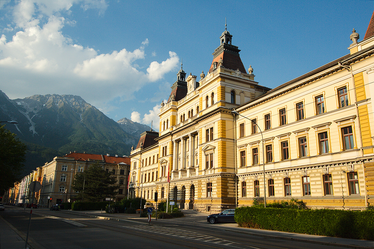 Die Bundesbahndirektion in Innsbruck. Im Hintergrund die östlichen Gipfel der Innsbrucker Nordkette.